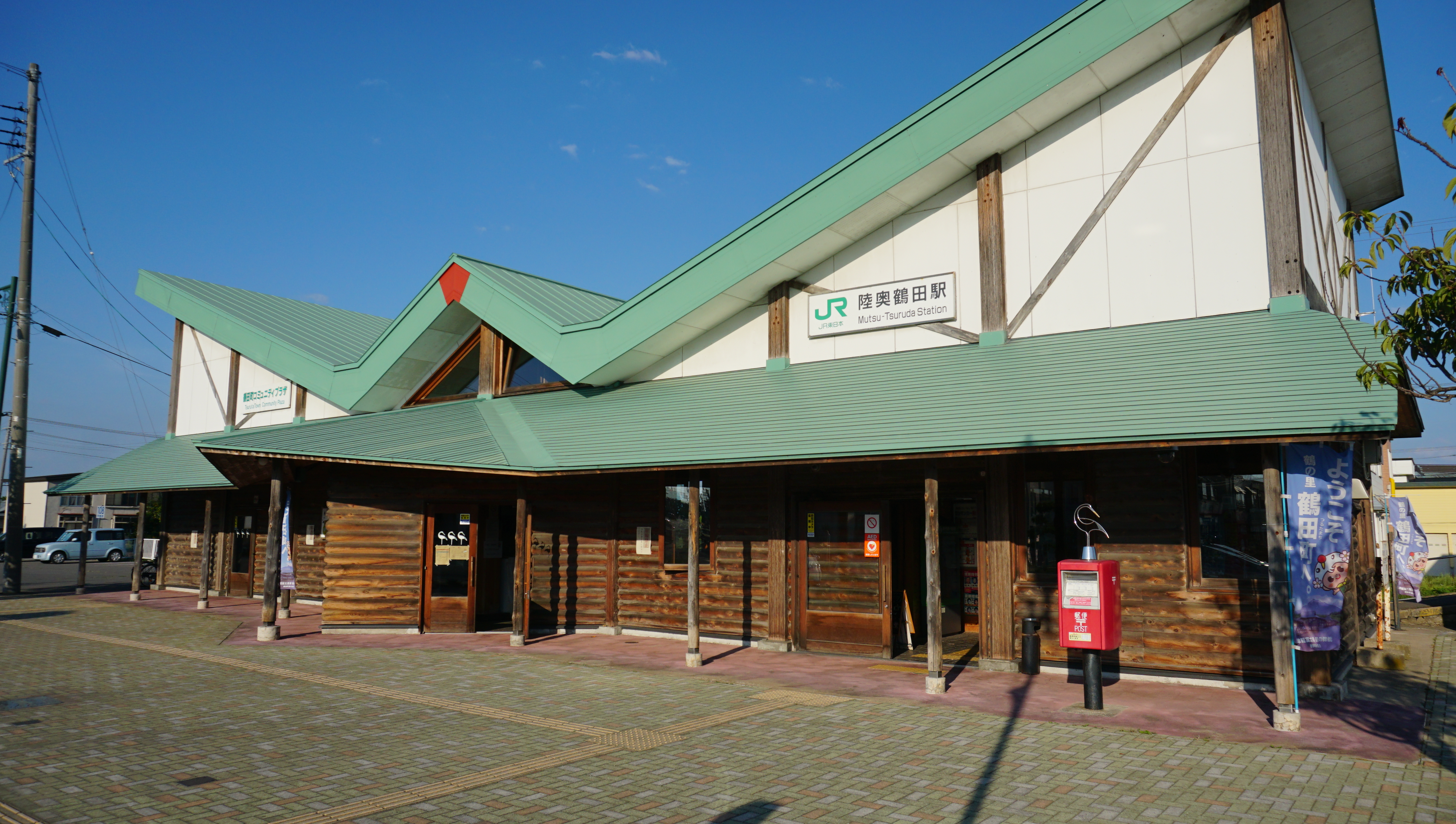 五能線 陸奥鶴田駅（青森県北津軽郡鶴田町）